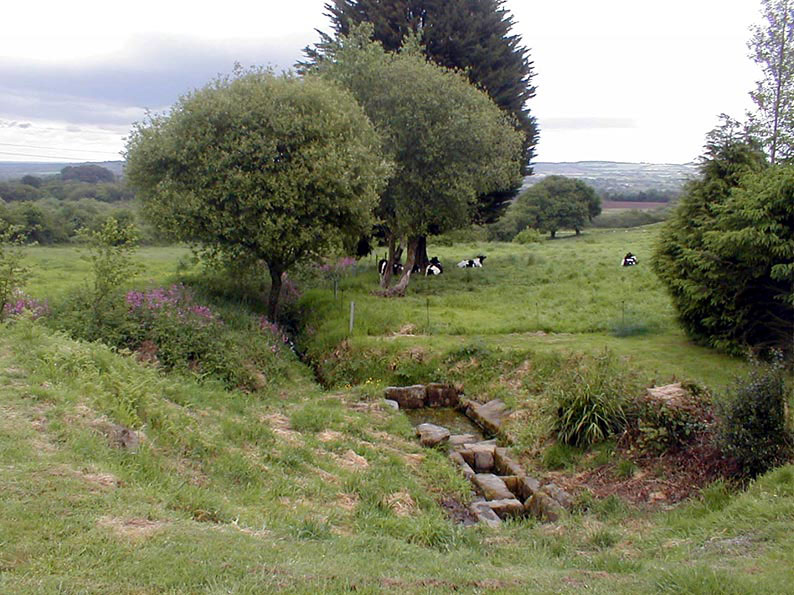 Yeodi- mammenn-1